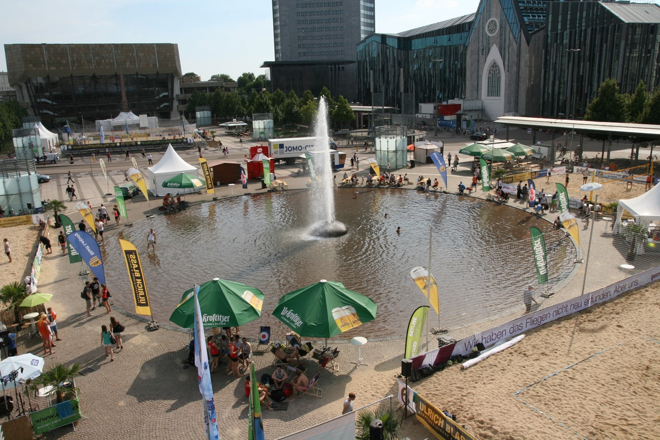 Luftaufnahme des SachsenBeach-Geländes auf dem Augustusplatz in Leipzig